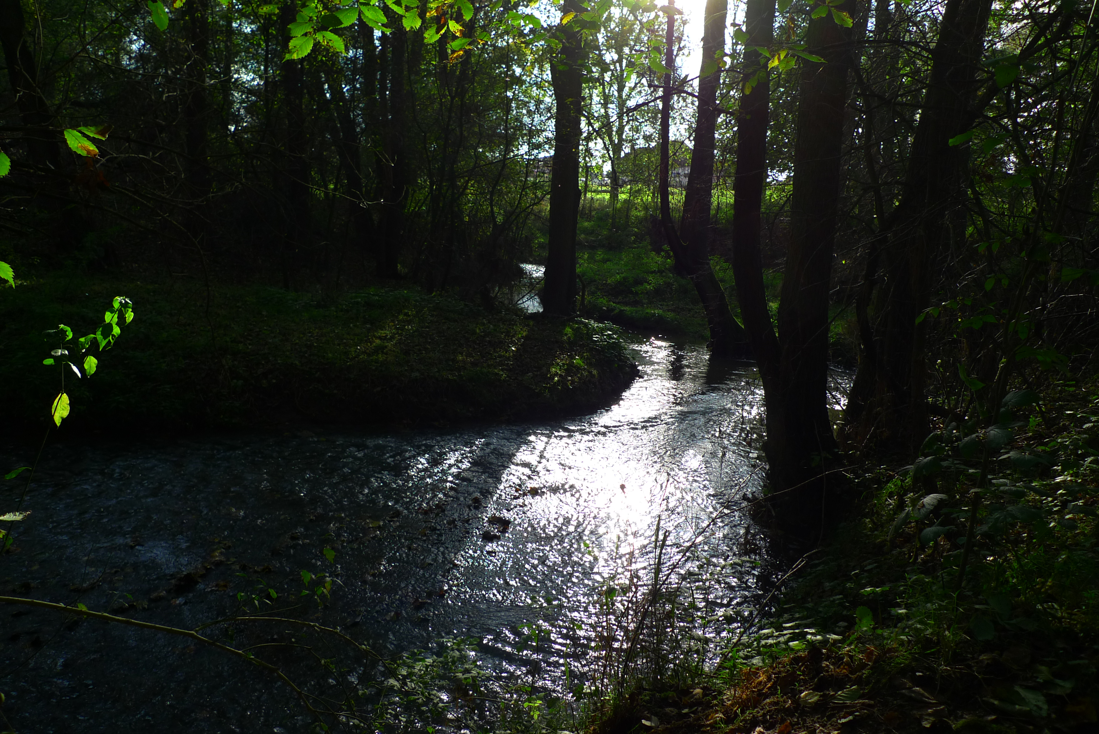 údolí Pitkovického potoka